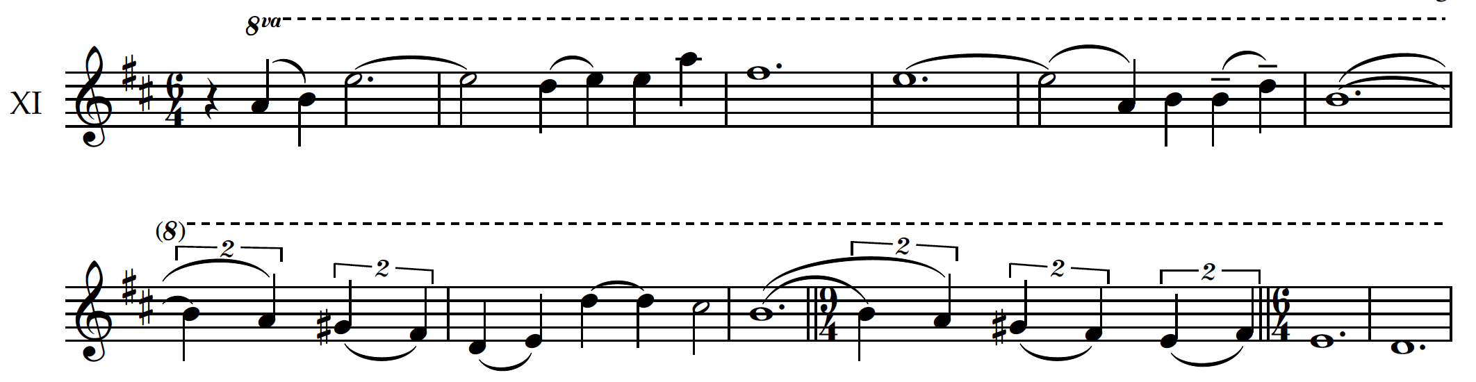 Motiu del trio 2 Gerhard